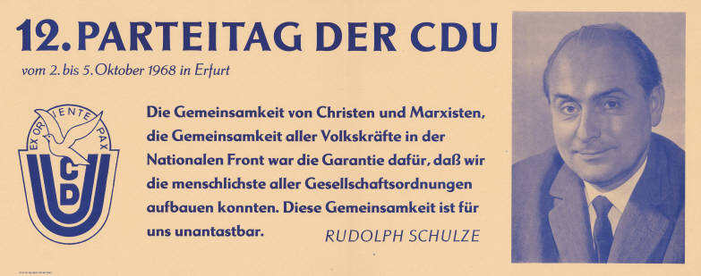 12. Parteitag der CDU ... Die Gemeinsamkeit von Christen und Marxisten die Gemeinsamkeit aller Volkskräfte in der Nationalen Front war die Garantie dafür, daß wir die menschlichste aller Gesellschaftsordnungen aufbauen konnten ... Rudolph Schulze Abbildung: Parteilogo - Porträtfoto Rudolph Schulze Plakatart: Kandidaten-/Personenplakat mit Porträt Drucker_Druckart_Druckort: III-9-19 Ag 224-100-68 7265 Objekt-Signatur: 10-024 : 3074 Bestand: Plakate aus der SBZ/DDR (10-024) GliederungBestand10-18: Ost-CDU / CDUD / Exil-CDU Lizenz: KAS/ACDP 10-024 : 3074 CC-BY-SA 3.0 DE